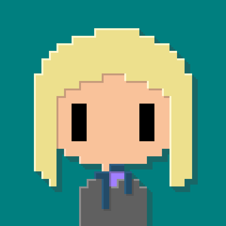 En pixel art, composé de carrés, une jeune femme sur fond magenta avec un pull rayé byzantin/noir/bleu clair.